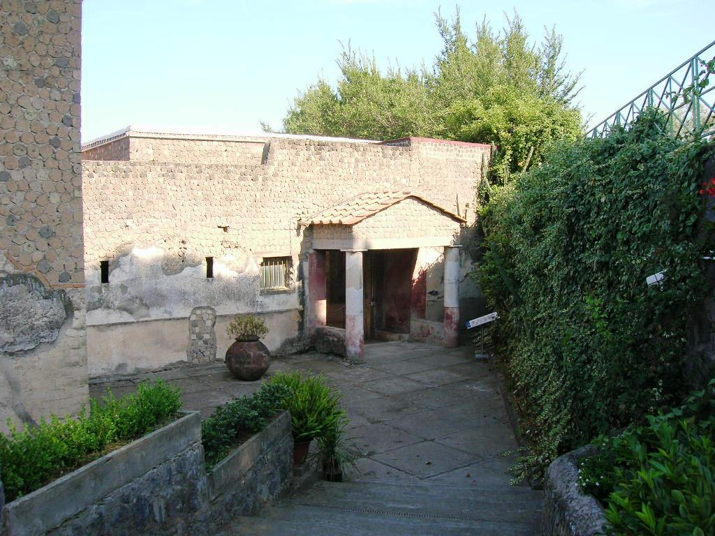 L'ingresso principale di Villa Arianna